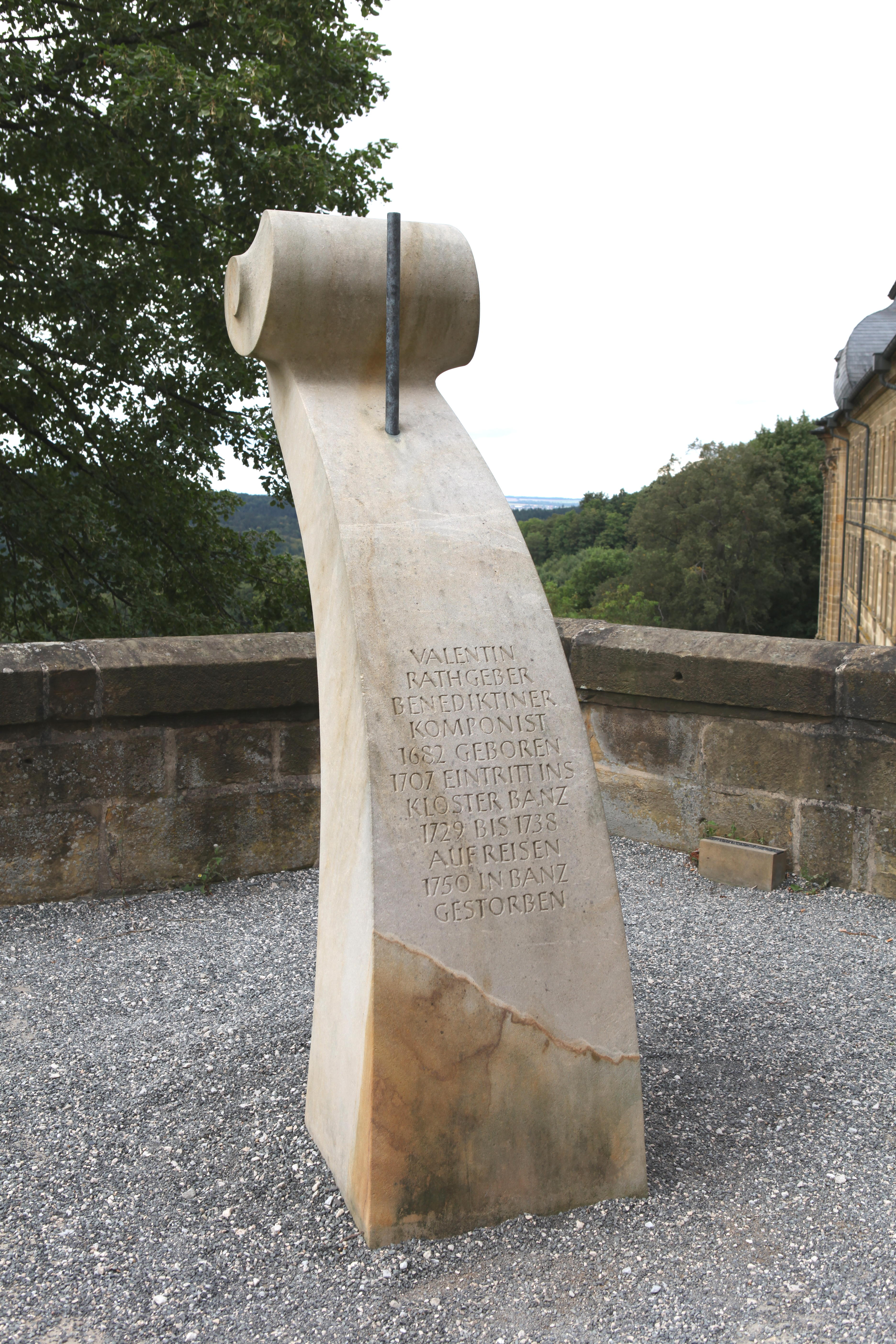 Denkmal Valentin Rathgeber im Klosterhof Banz, vom Weismainer Steinbildhauermeister Joachim Mende